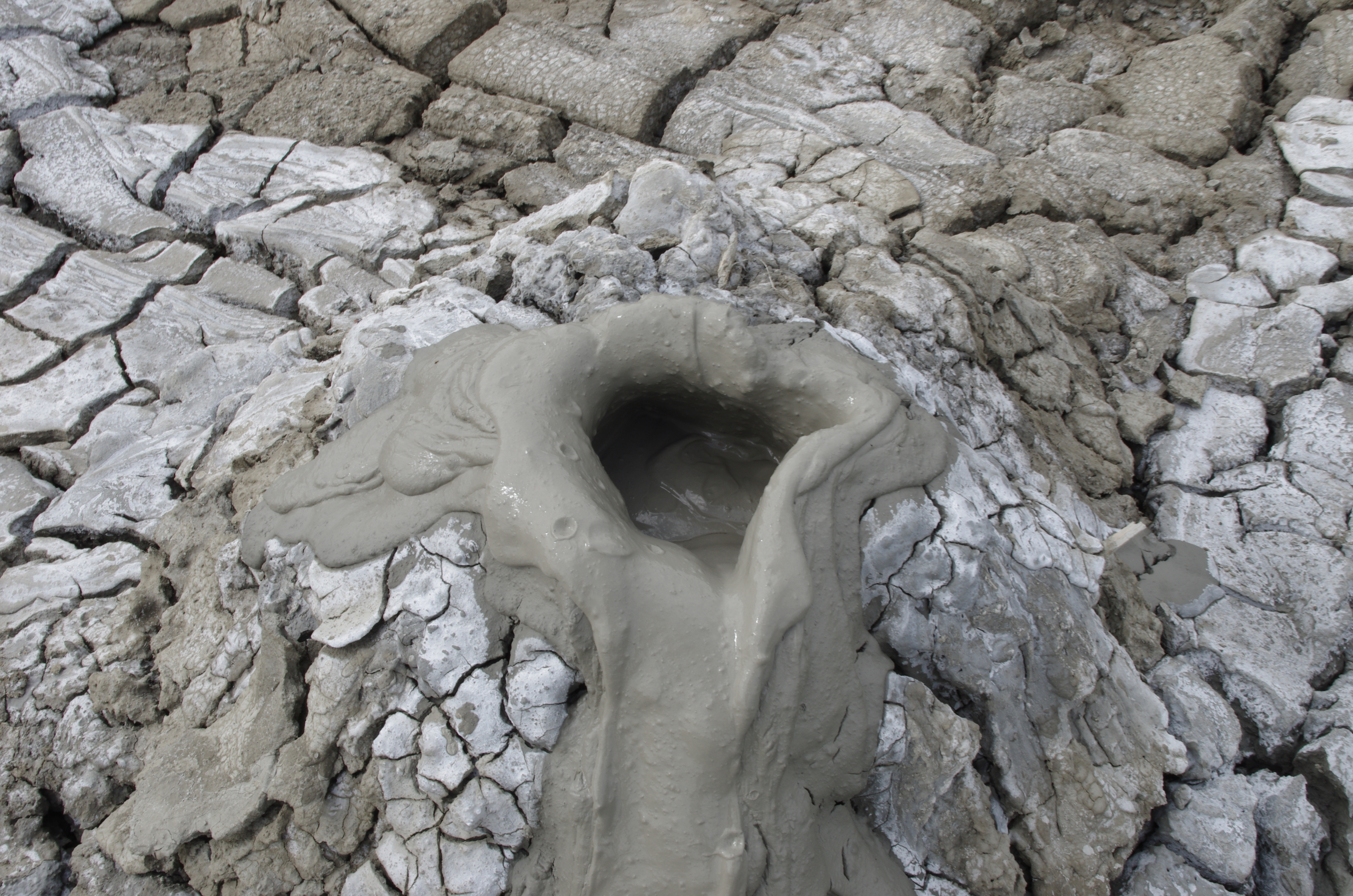 Aragona auf Sizilien in Italien. Die Macalube sind ein Gebiet mit kleinen Schlammvulkanen. Diese stossen auch giftige Gasse aus (Schwefelwasserstoff). 2015 sind hier zwei Kinder bei einem größeren Schlammausbruch gestorben.